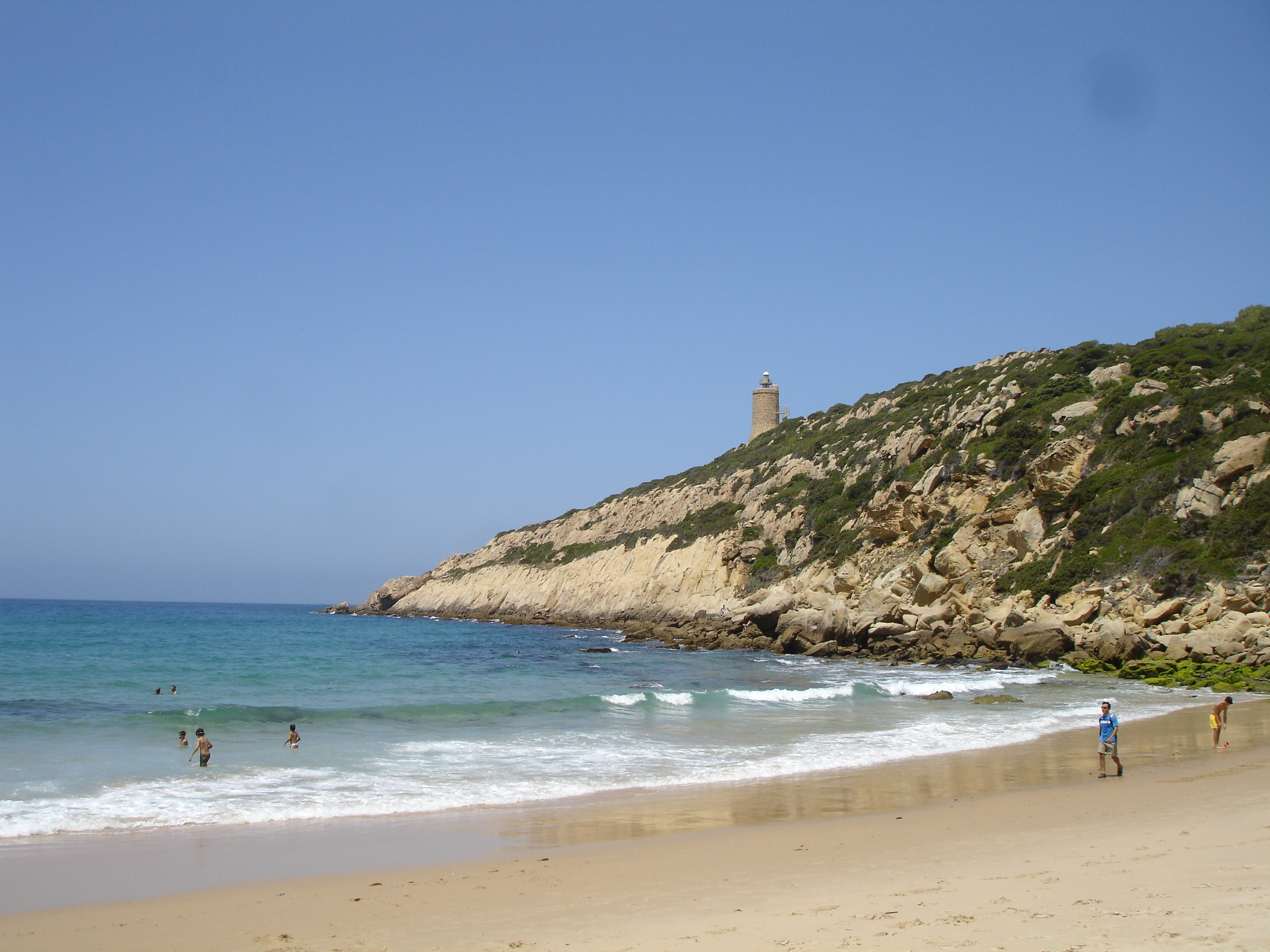 Playa del Cañuelo beach. Tarifa (Andalusia, Spain)